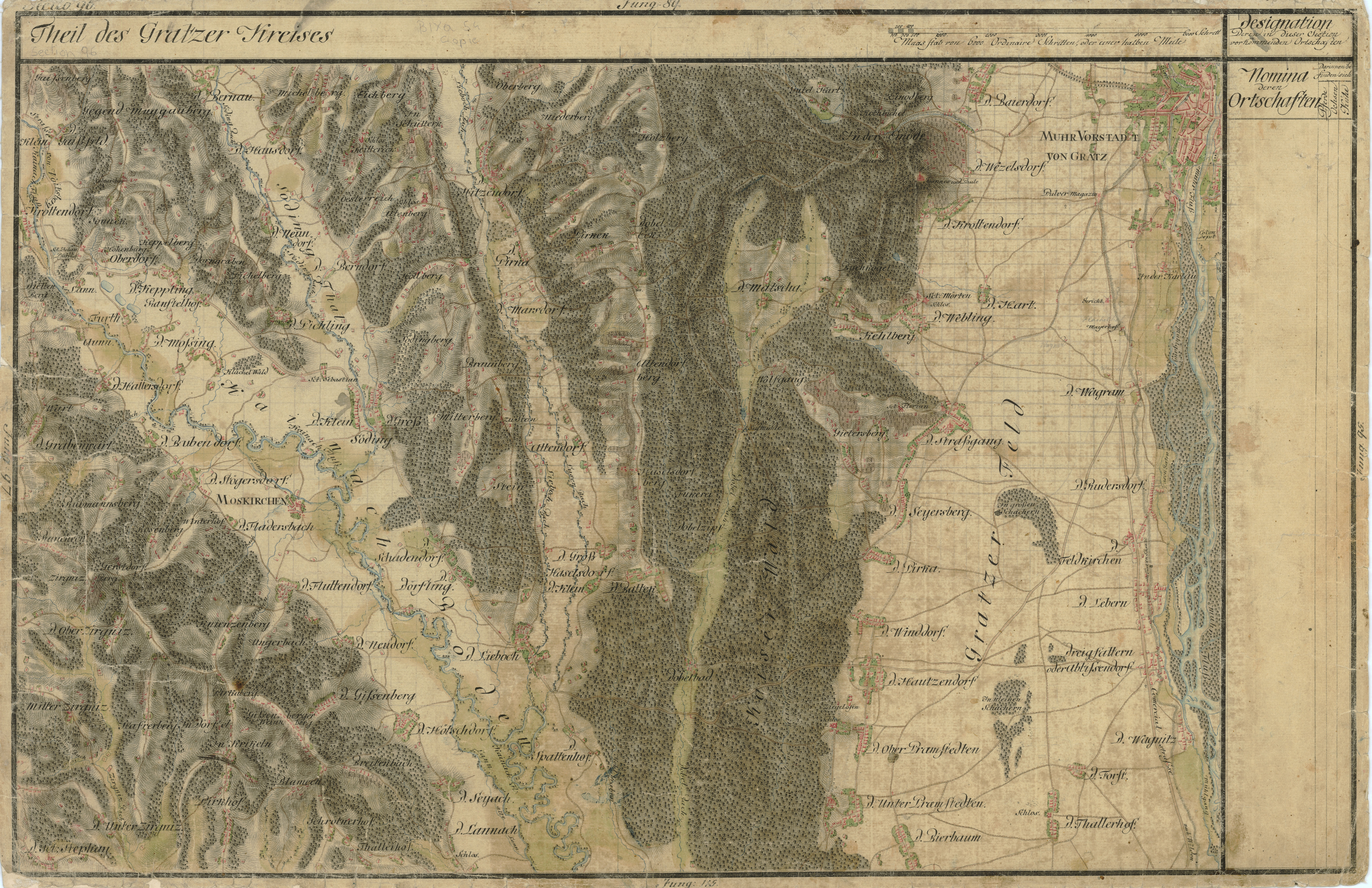 historische Landkarte BIXa054_section 096 Josephinische Landesaufnahme: Gebiet von Mooskirchen bis Grazer Feld, Steiermark, Österreich